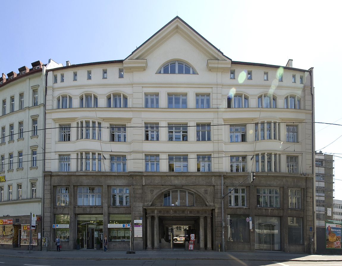 Bayerstraße 57-59, Pressehaus Bayerstraße, Jugendstil-Geschäftshaus, 1901 von Martin Dülfer, Ornamente 1929 beseitigt.